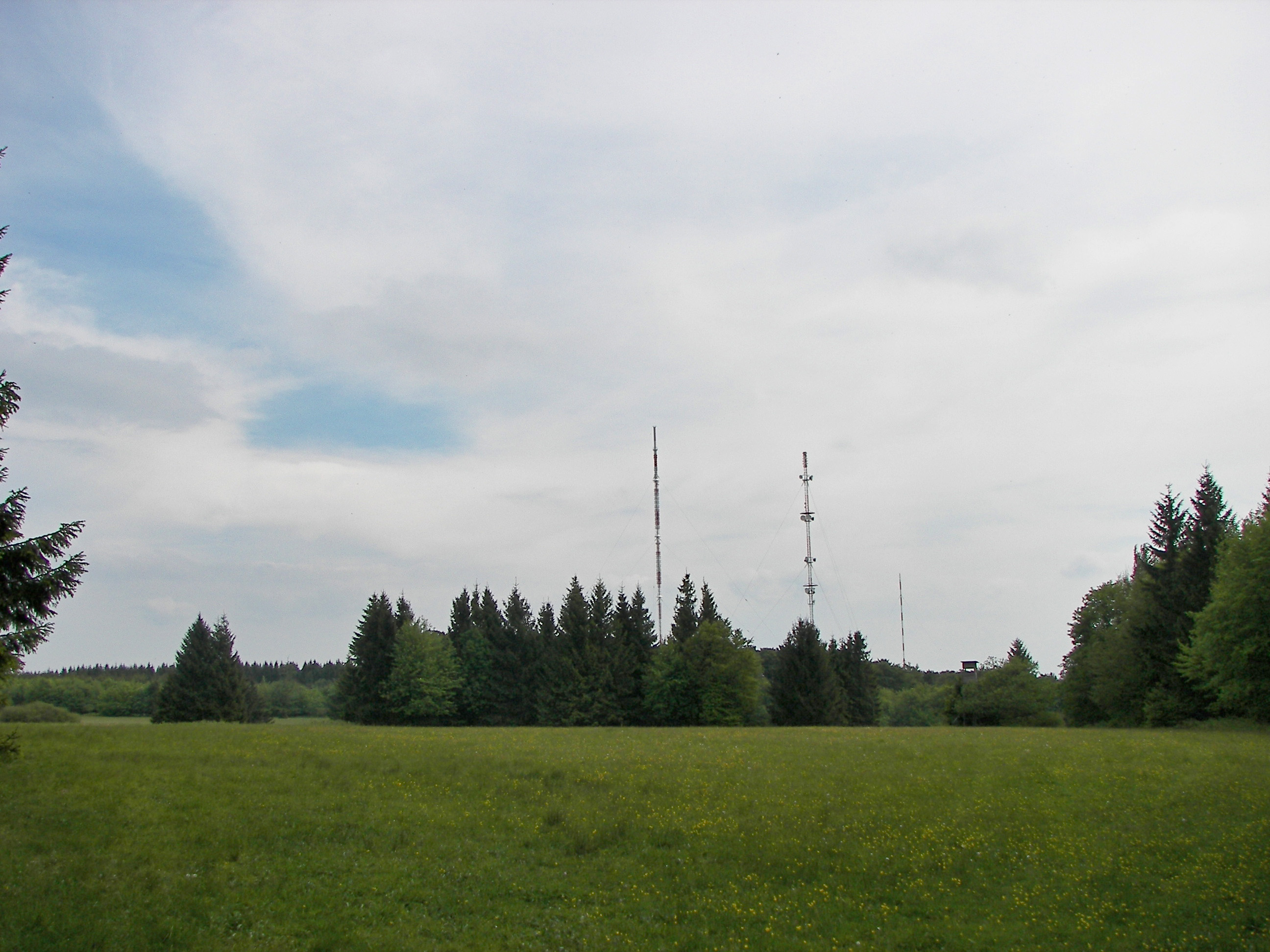 Sendeanlagen auf dem hohem Meißner